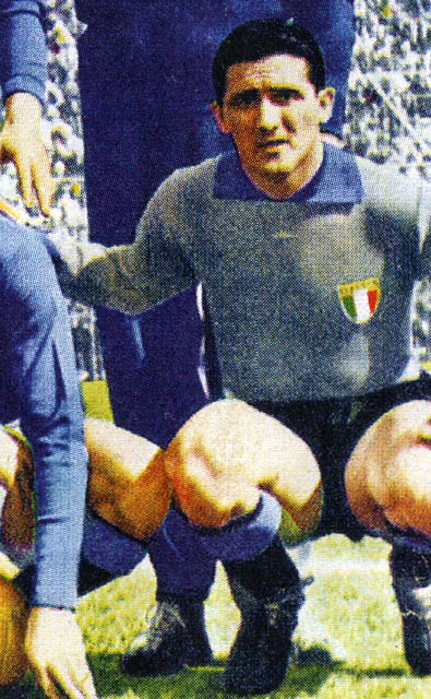 Milano, stadio San Siro, 25 aprile 1956. Il portiere di calcio italiano Giovanni Viola con l'Italia, in occasione della vittoriosa amichevole contro il Brasile (3-0).